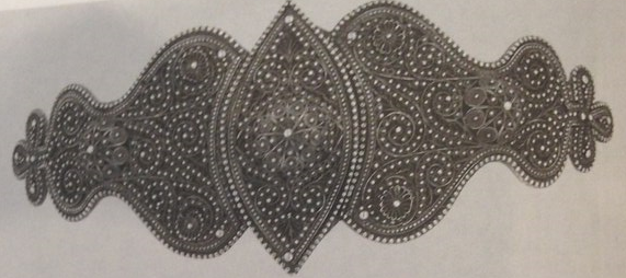 Пряжка женского пояса, серебро, город Шуши (Арцах). 1908 г.